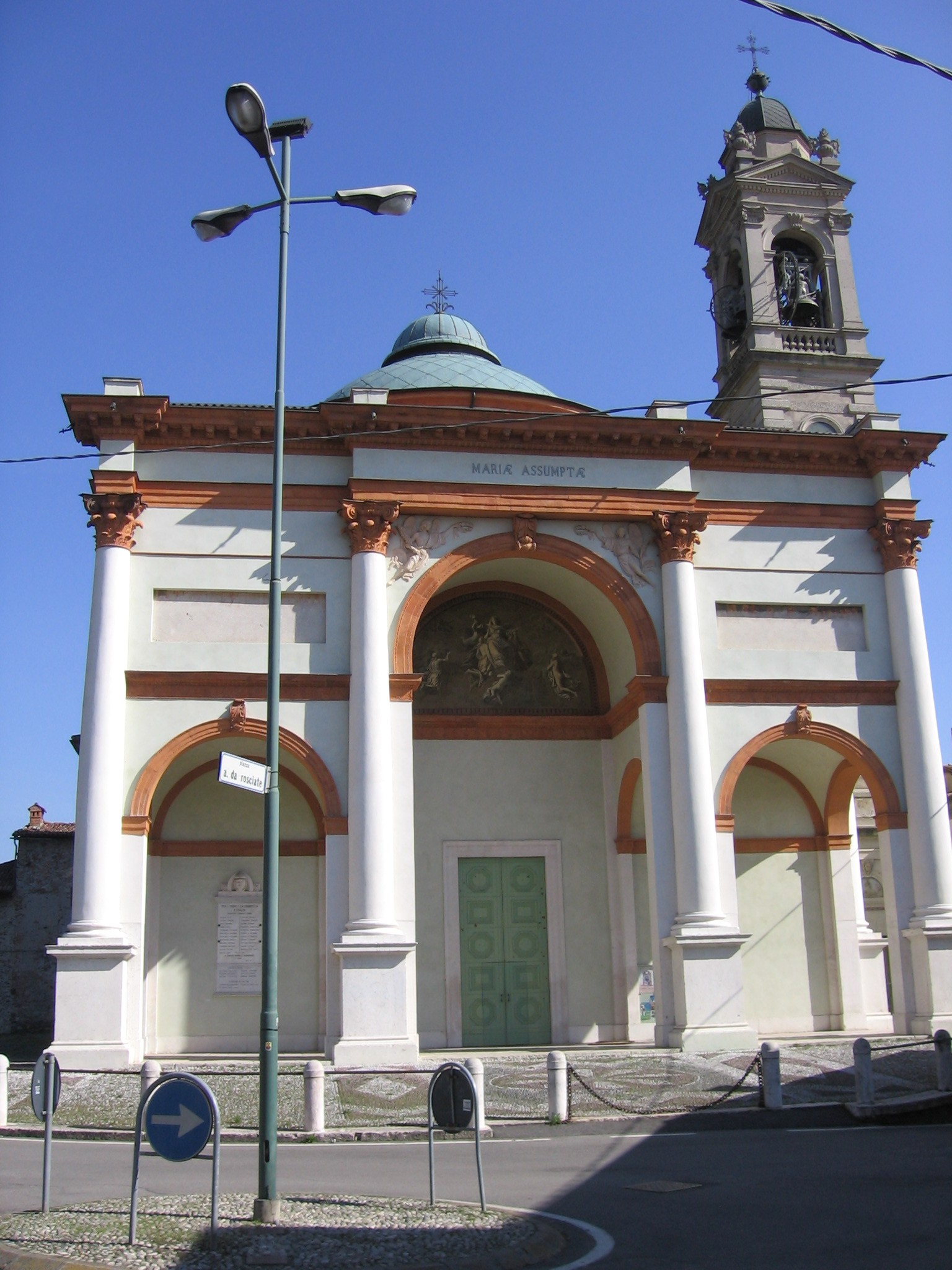 Chiesa di Rosciate, Scanzorosciate, Bergamo, Italy